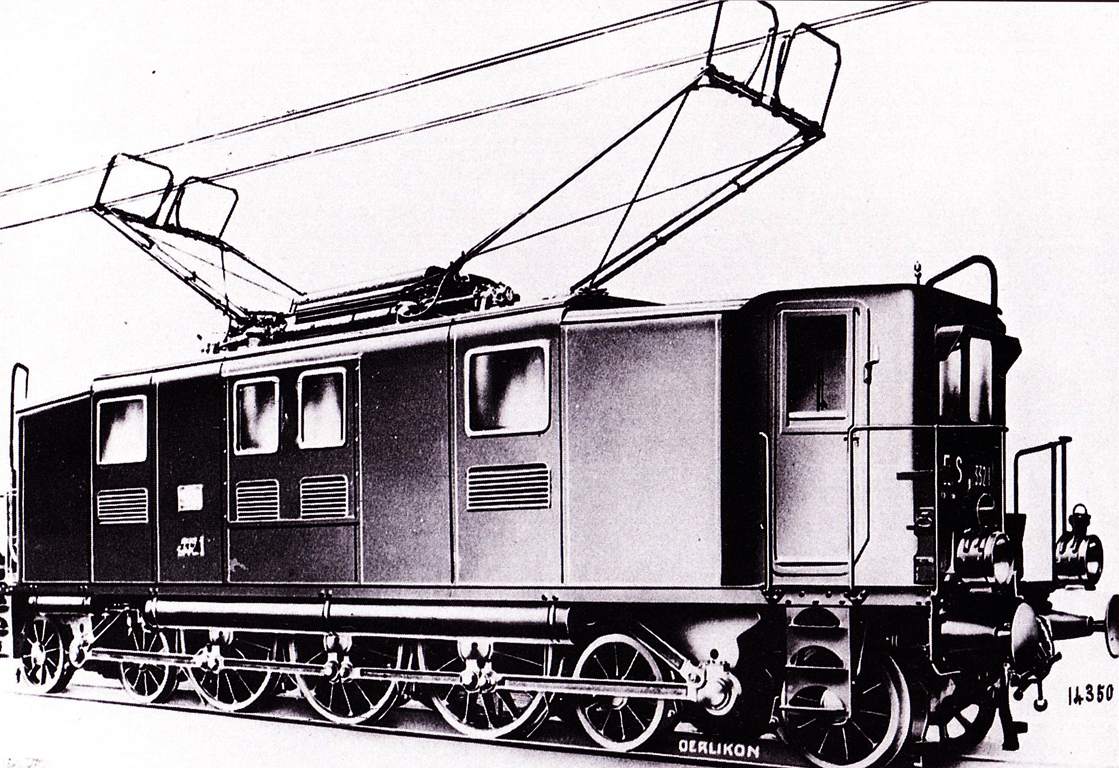 Foto di fabbrica della locomotiva elettrica trifase E.332.1 delle Ferrovie dello Stato.